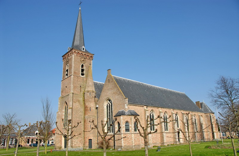 Zicht op een deel van de Sint-Adriaanskerk_Dreischor, rijksmonument 11162